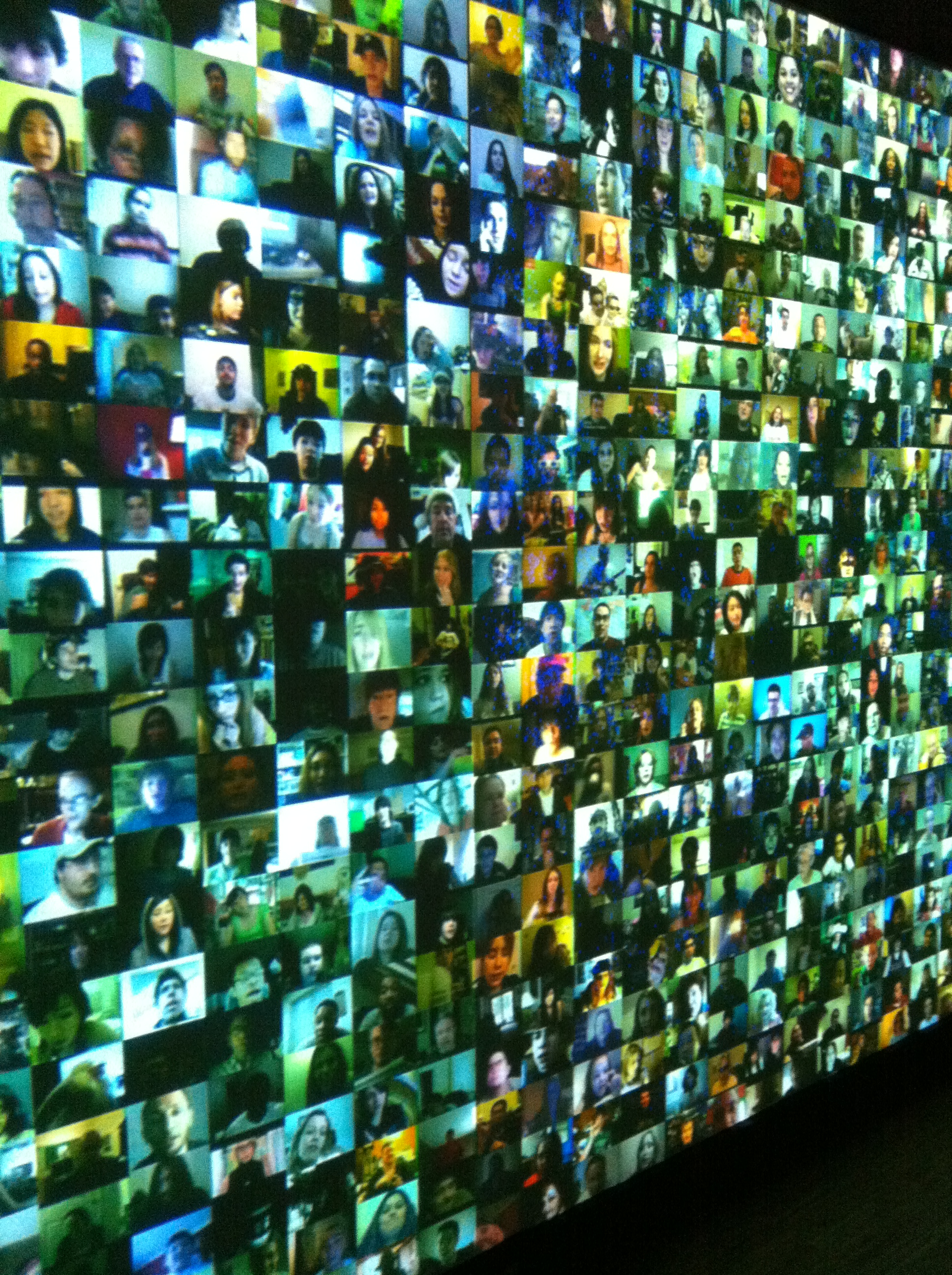 Details of Big Bang Data exhibit at CCCB